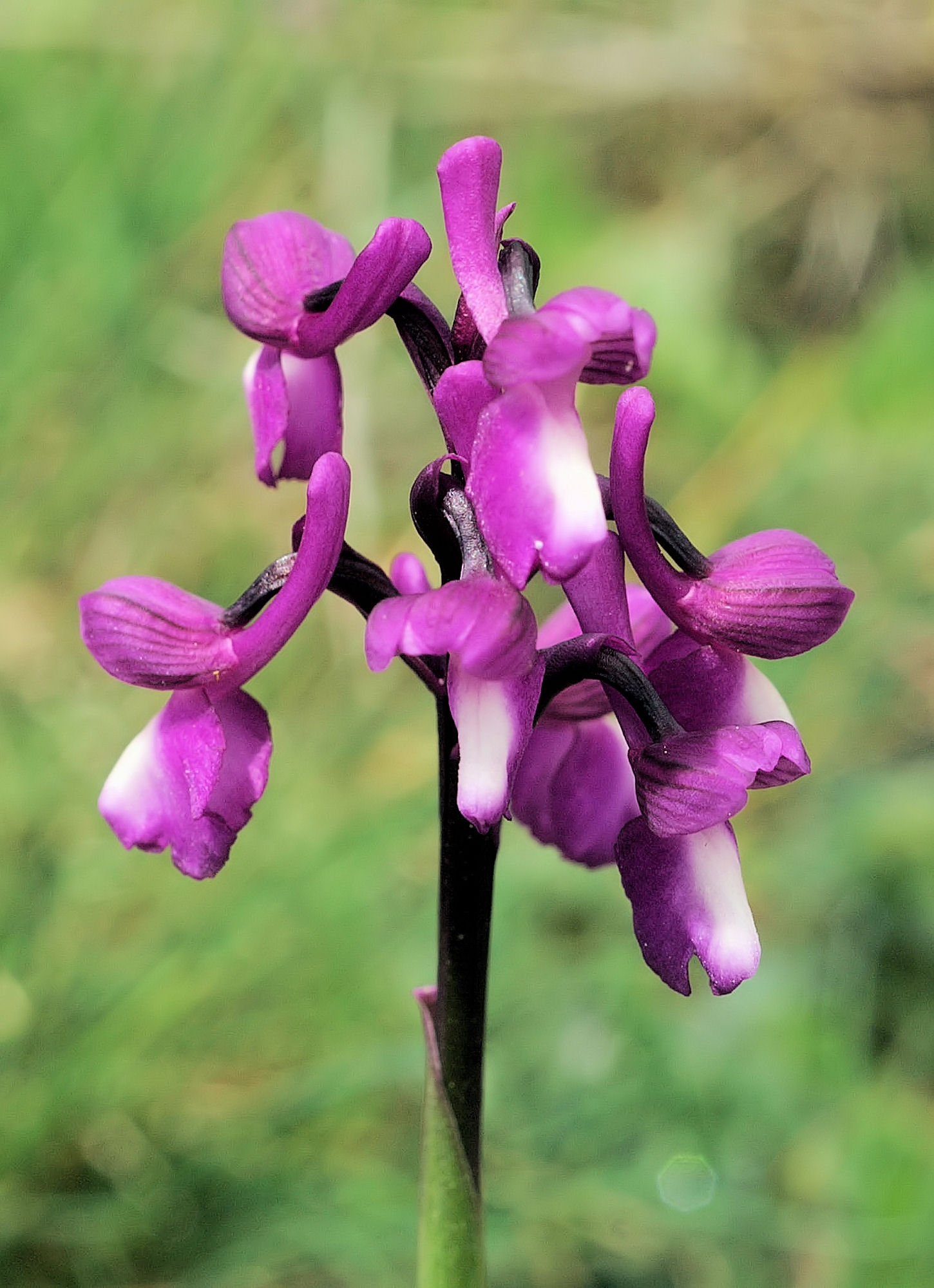 Anacamptis morio subsp. champagneuxii